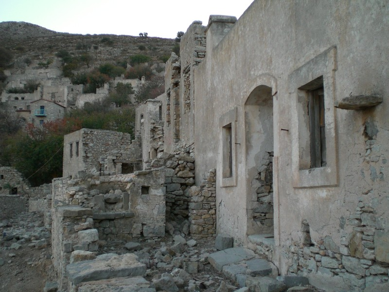 Titel: Mikro Horio - spookstadje Locatie: Tilos, Griekenland Datum: september 2006 Fotograaf: Gebruiker:IMFJ